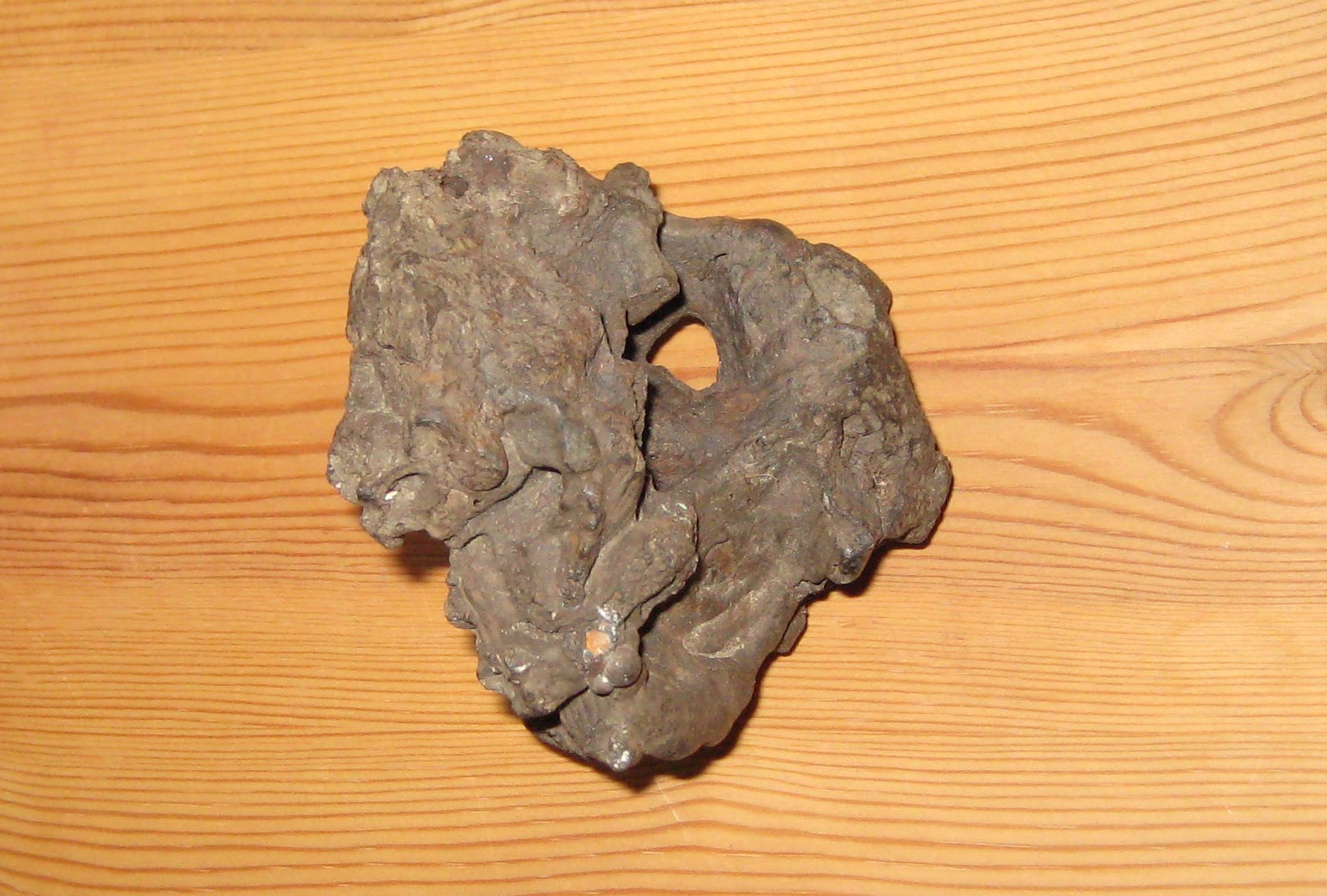 Slaggklump av myrmalm